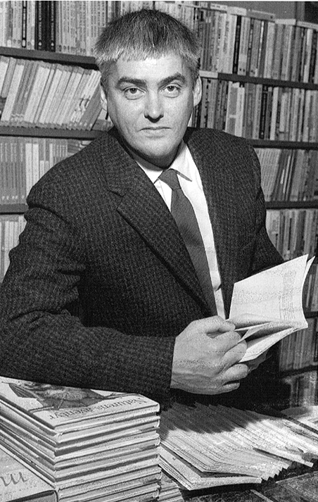 Bengt Anderberg (1920-2008) signing of his book Dantes Inferno